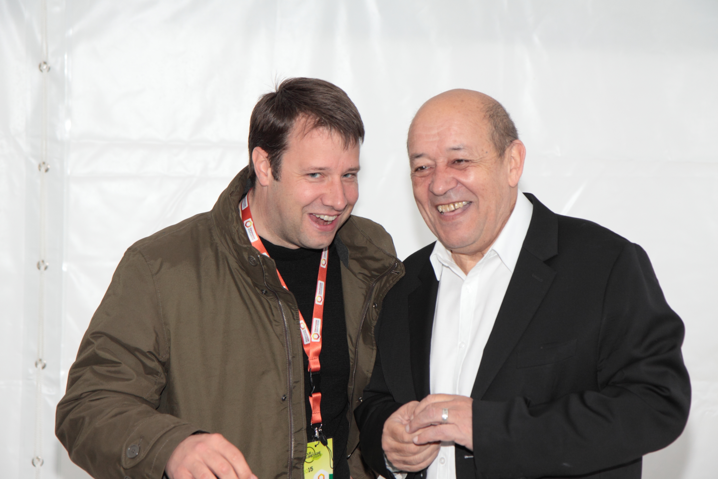 Visite de Jean-Yves Le Drian sur le Tour de Bretagne 2015, étape de Liffré. Jean-Yves Le Drian et Loïg Chesnais-Girard